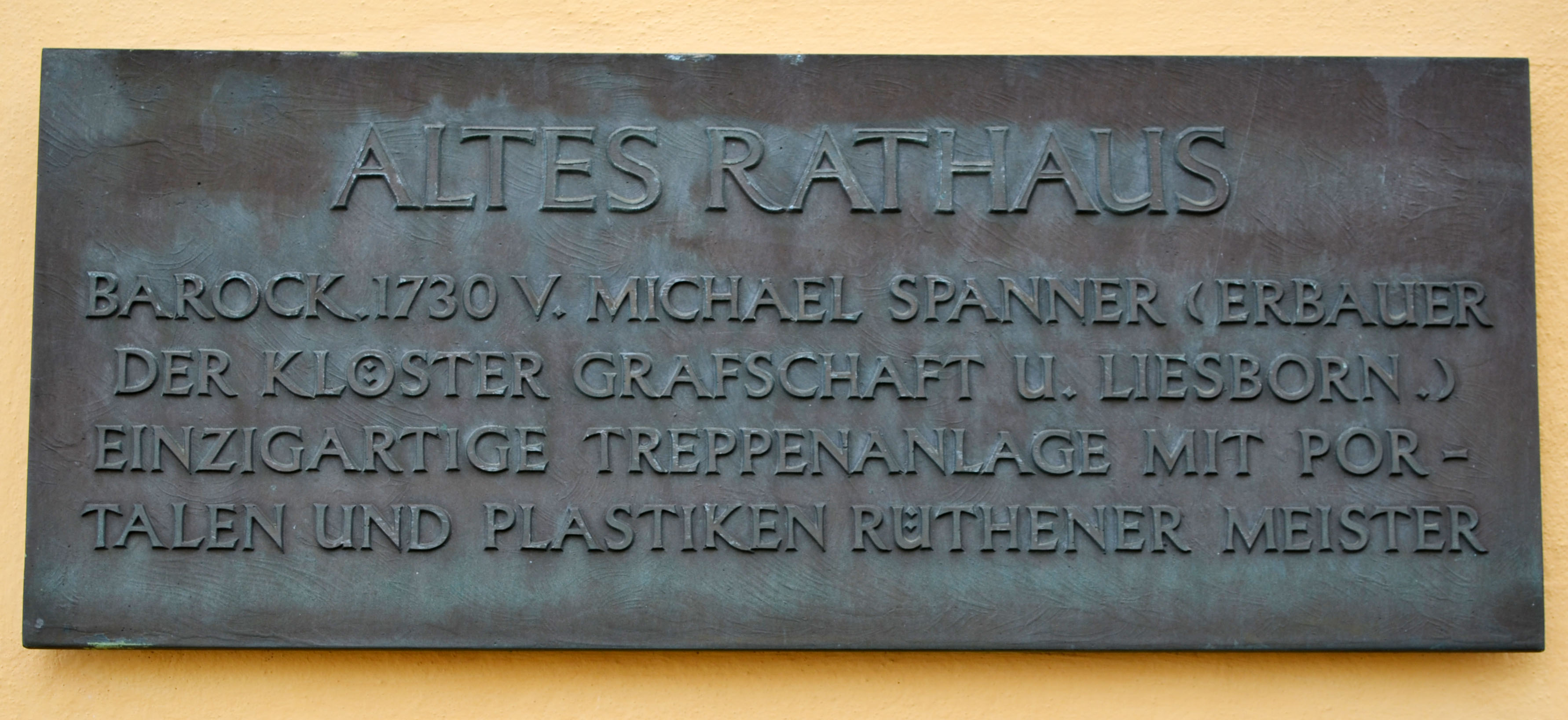 Rüthen altes Rathaus Inschrift außen